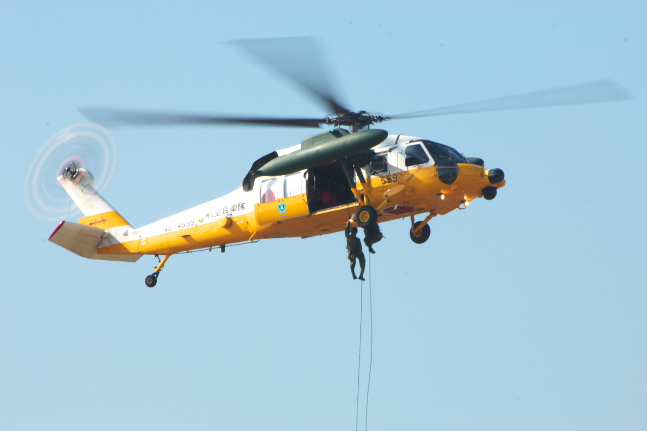 新田原基地航空祭2007より。救難帯のUH-60J。この後、救難デモ飛行を実施した。